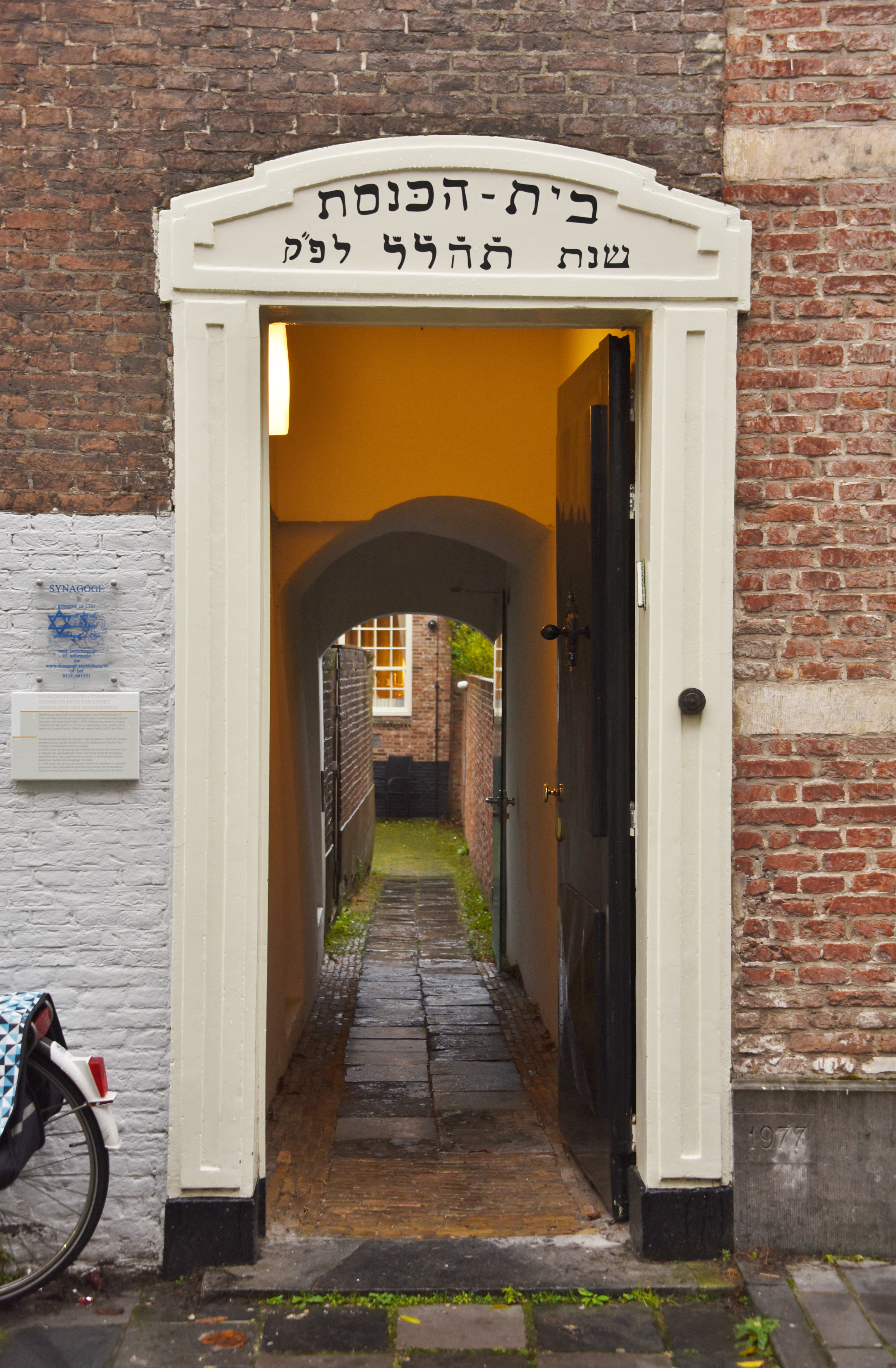 Eingang Synagoge